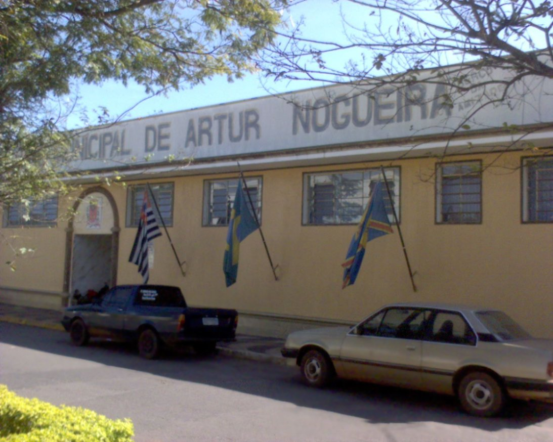 Prefeitura Municipal de Artur Nogueira SP Brasil - Artur Nogueira City Hall